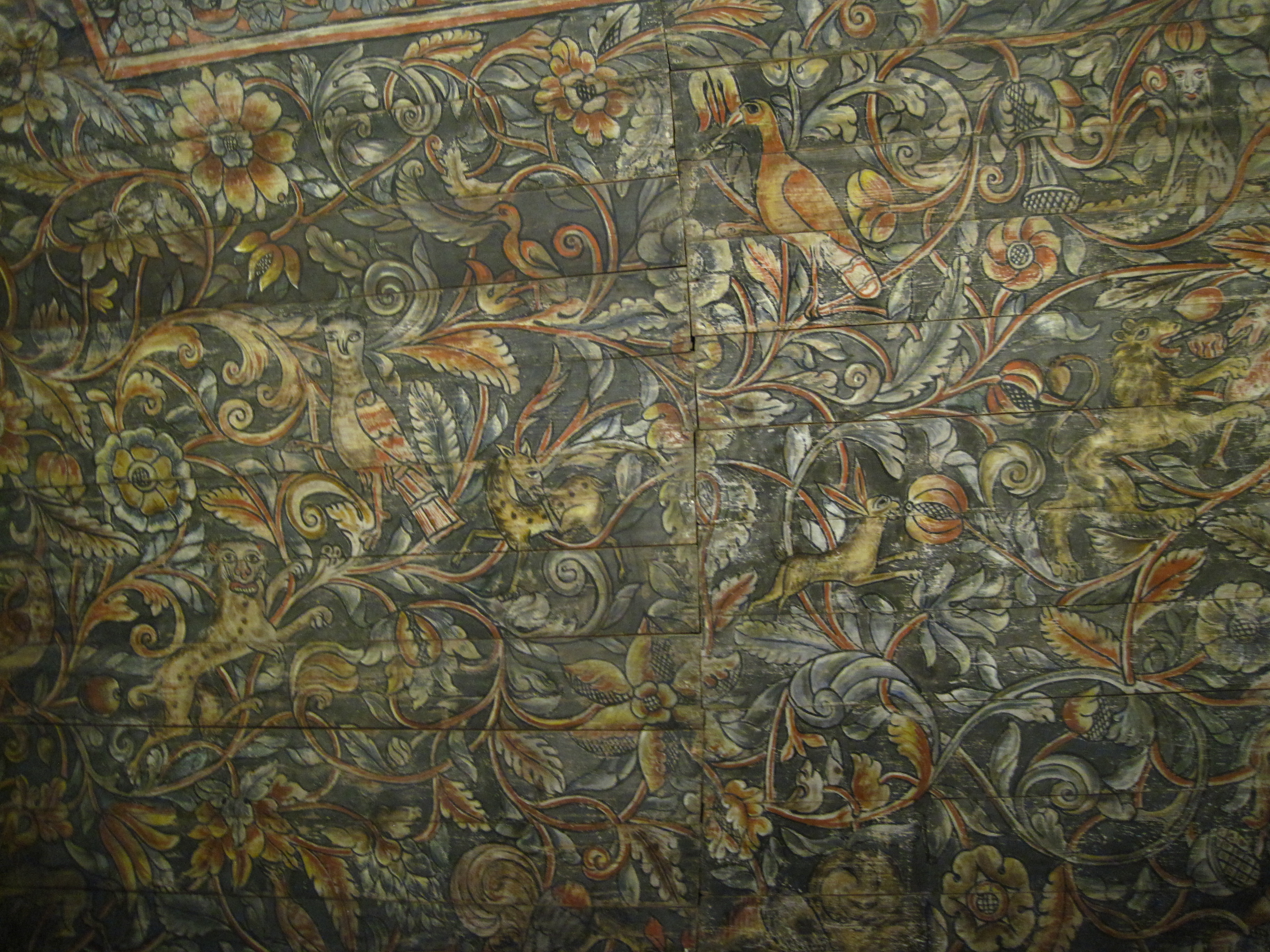 Horb Synagogue